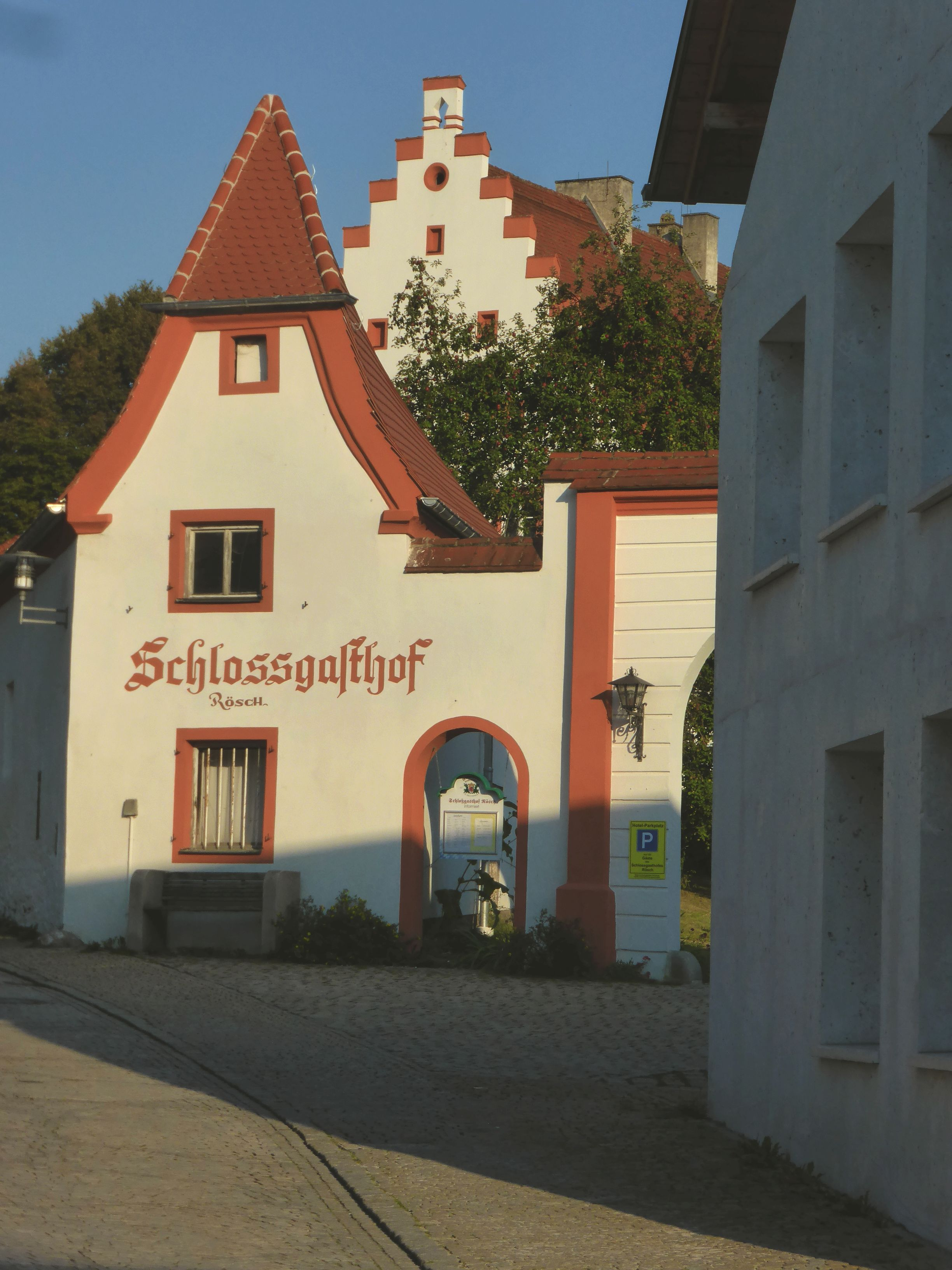 Schloss Blaibach - Viehwaage im Hof